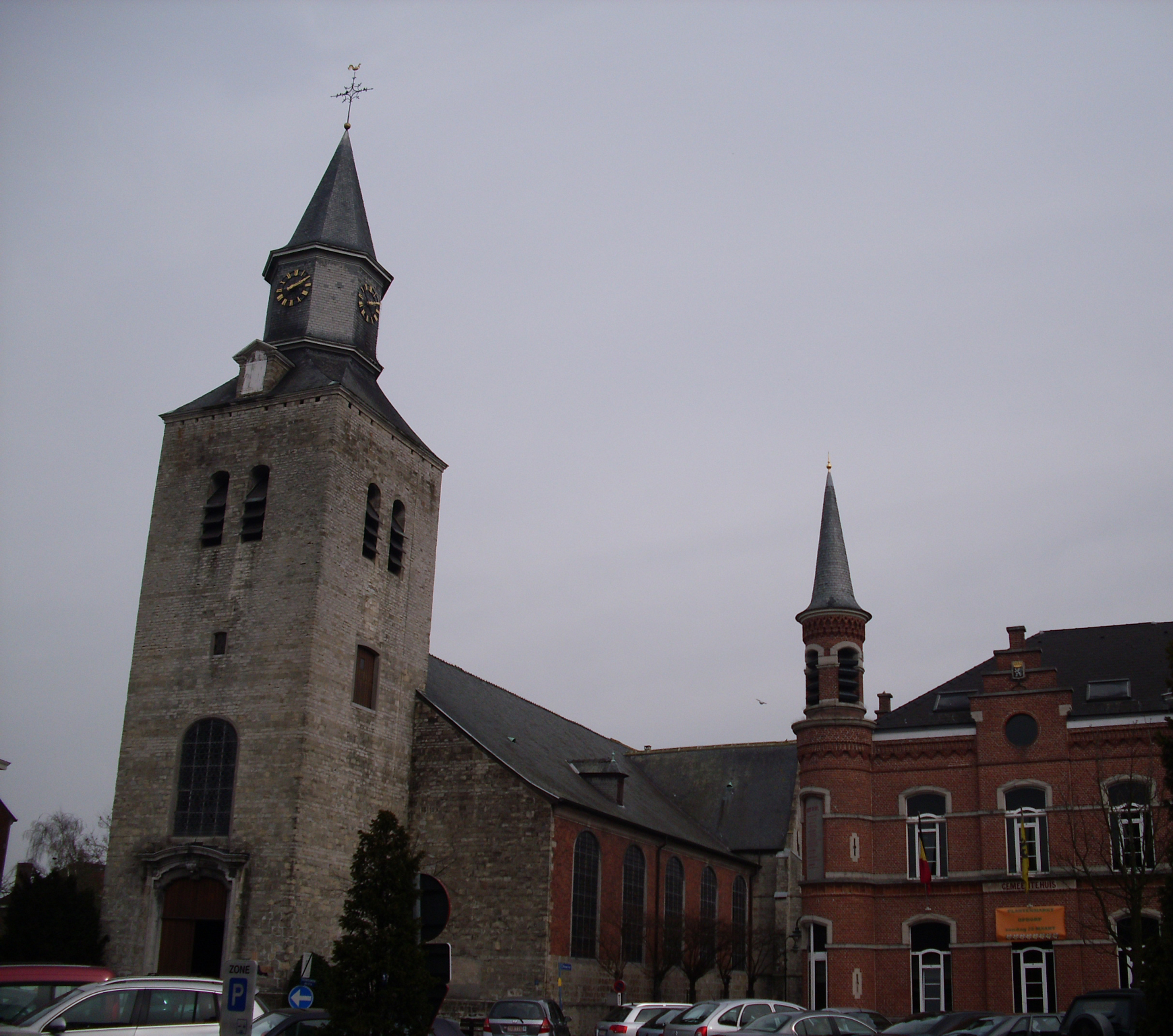 Sint-Niklaaskerk van Buggenhout - Oost-Vlaanderen - Vlaanderen - België